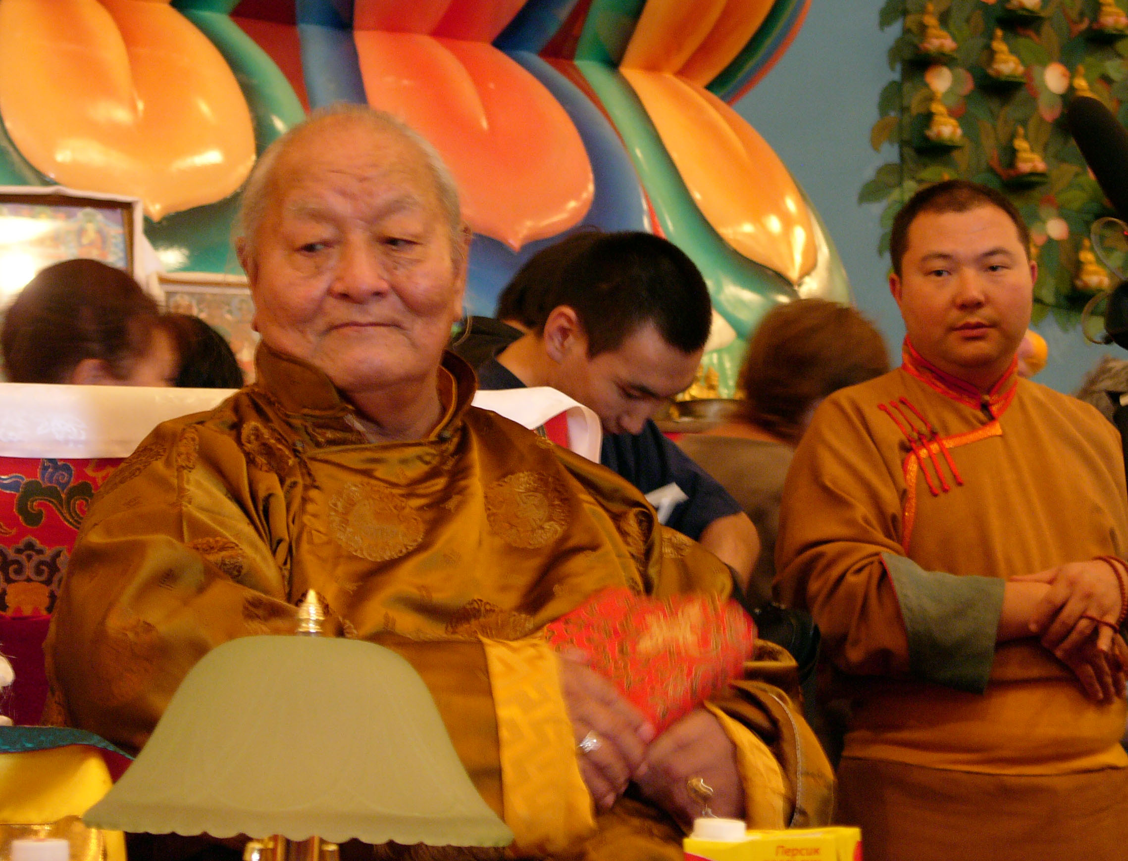 Мастер традиции Дзогчен Намкай Норбу Ринпоче и Шаджин-лама (духовный глава буддистов) Калмыкии Тэло Тулку Ринпоче